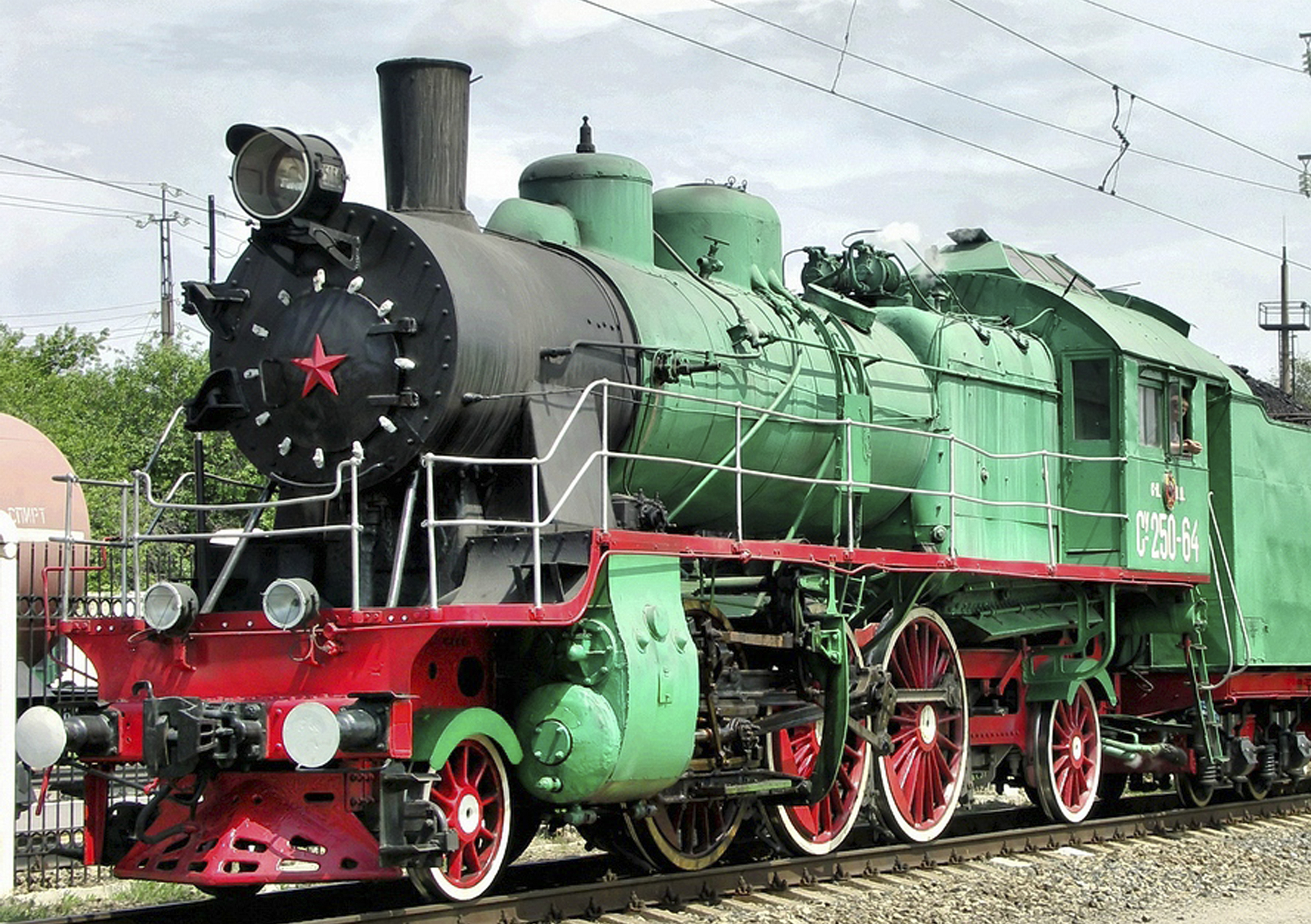 Паровоз построен в 1948 году Сормовским паровозостроительным заводом